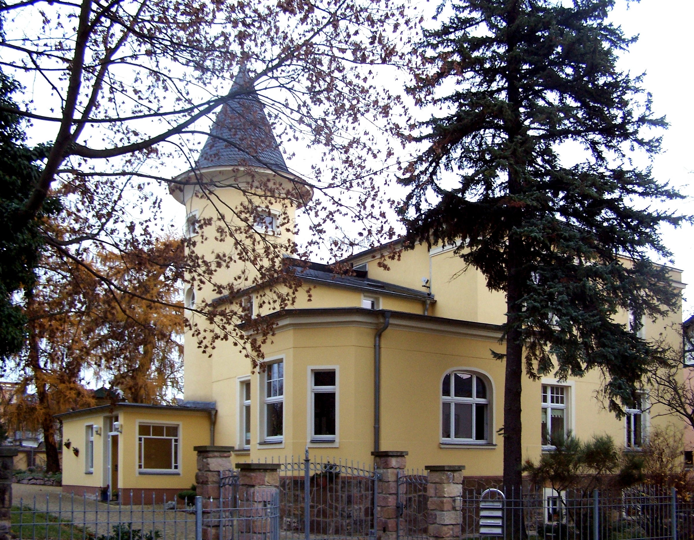 Gellertstr. 9 in Radebeul